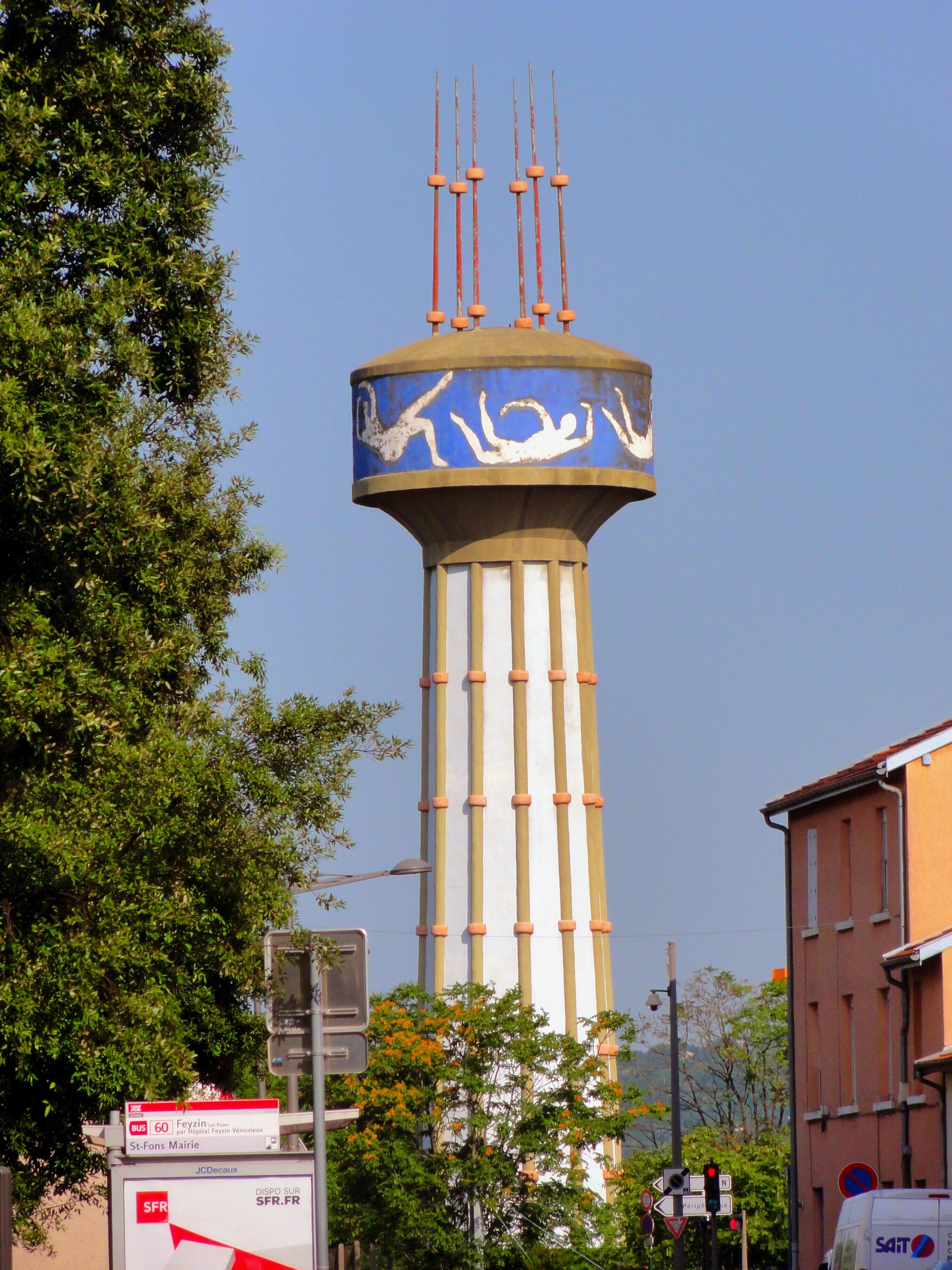 Le symbole de la commune : le château d'eau